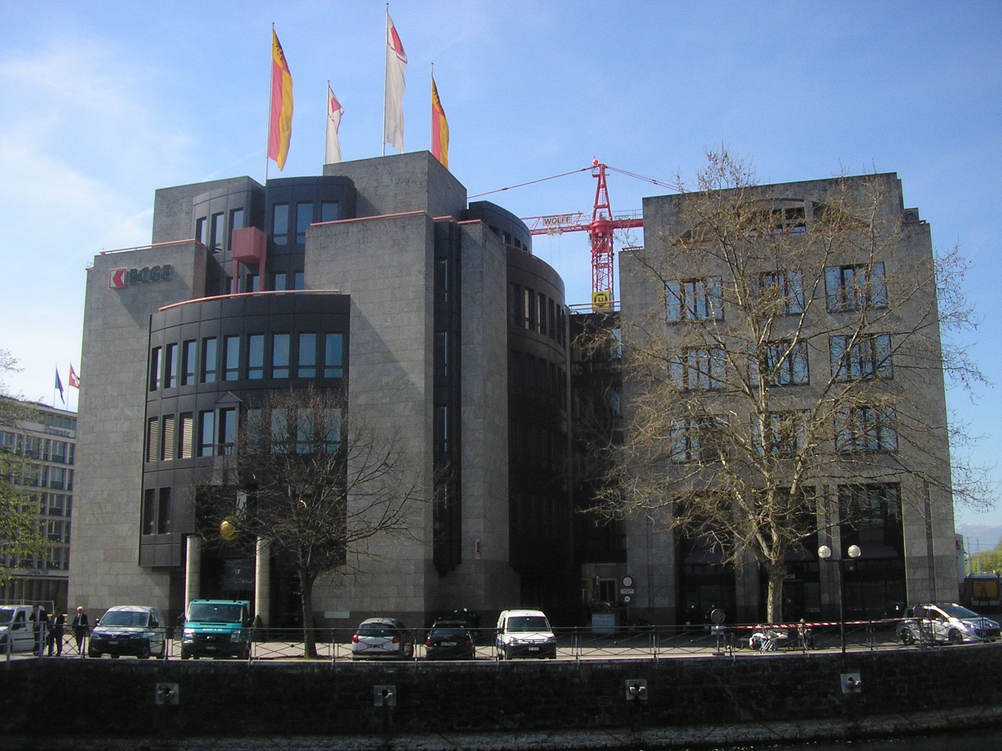 Bâtiment de la Banque cantonale de Genève, en l'Île, au coeur de la ville de Genève.